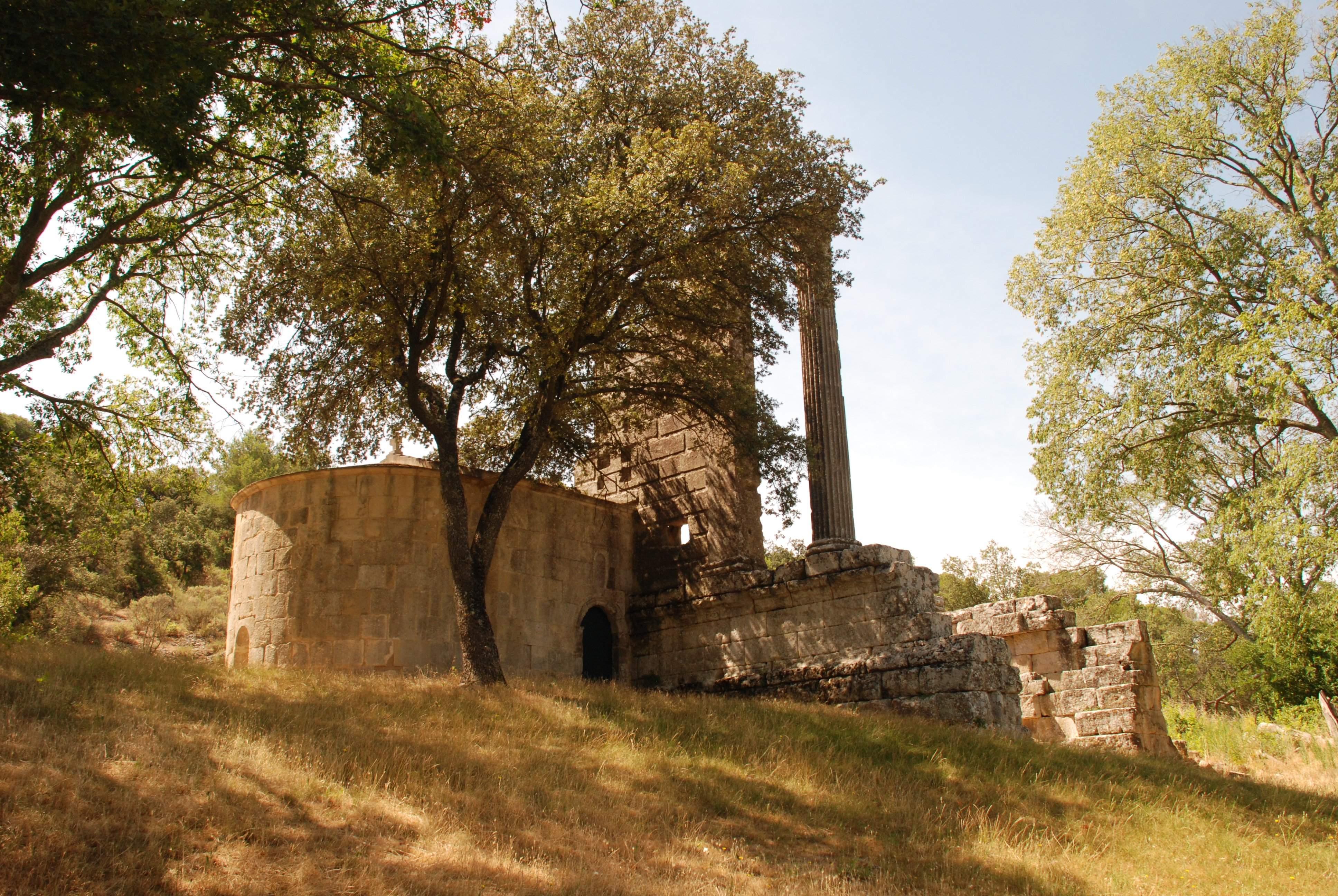 France - Provence - Chapelle Saint-Cézaire de Château-Bas